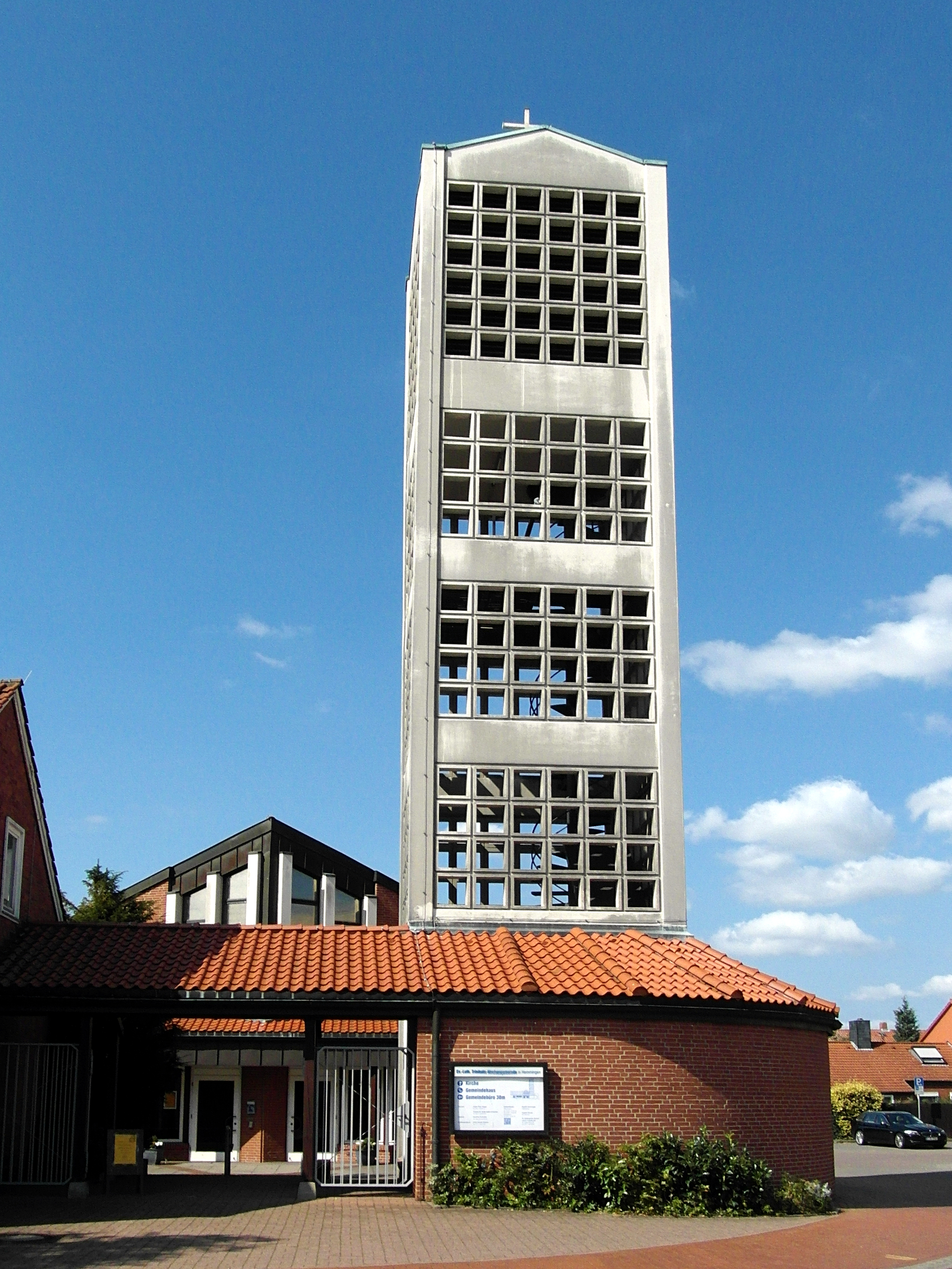 Trinitatis-Kirche in Hemmingen-Westerfeld